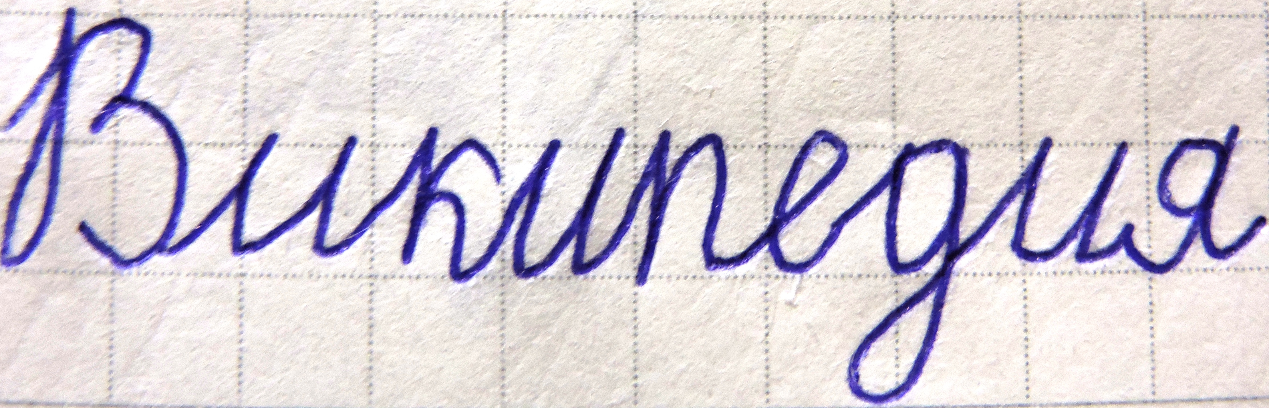 Слово «Википедия», написанное от руки.